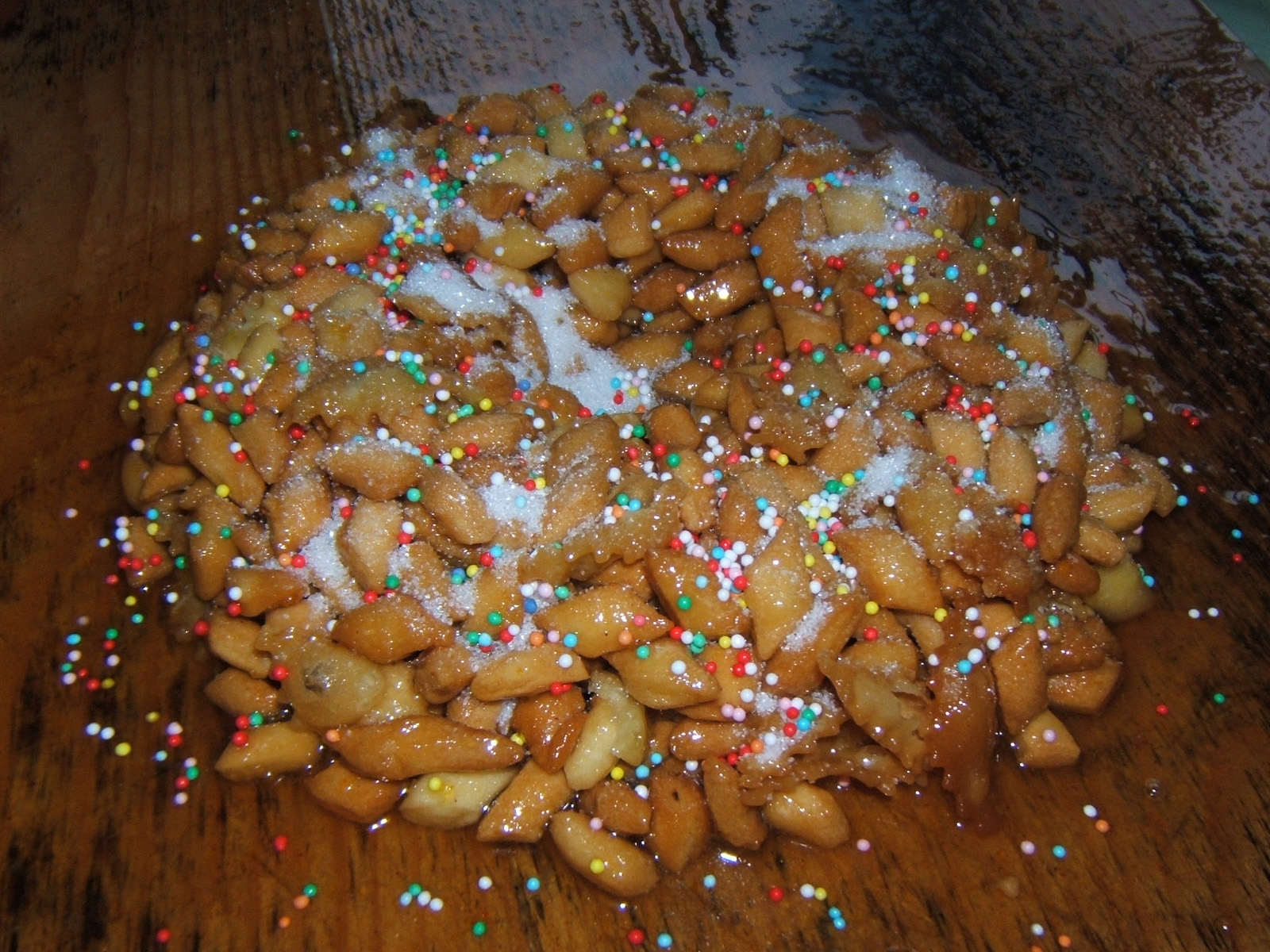 nu purciddhruzzu (plurale purciddhruzzi), tipico dolce natalizio salentino; il nome non è univoco: c'è anche purceddhuzzu